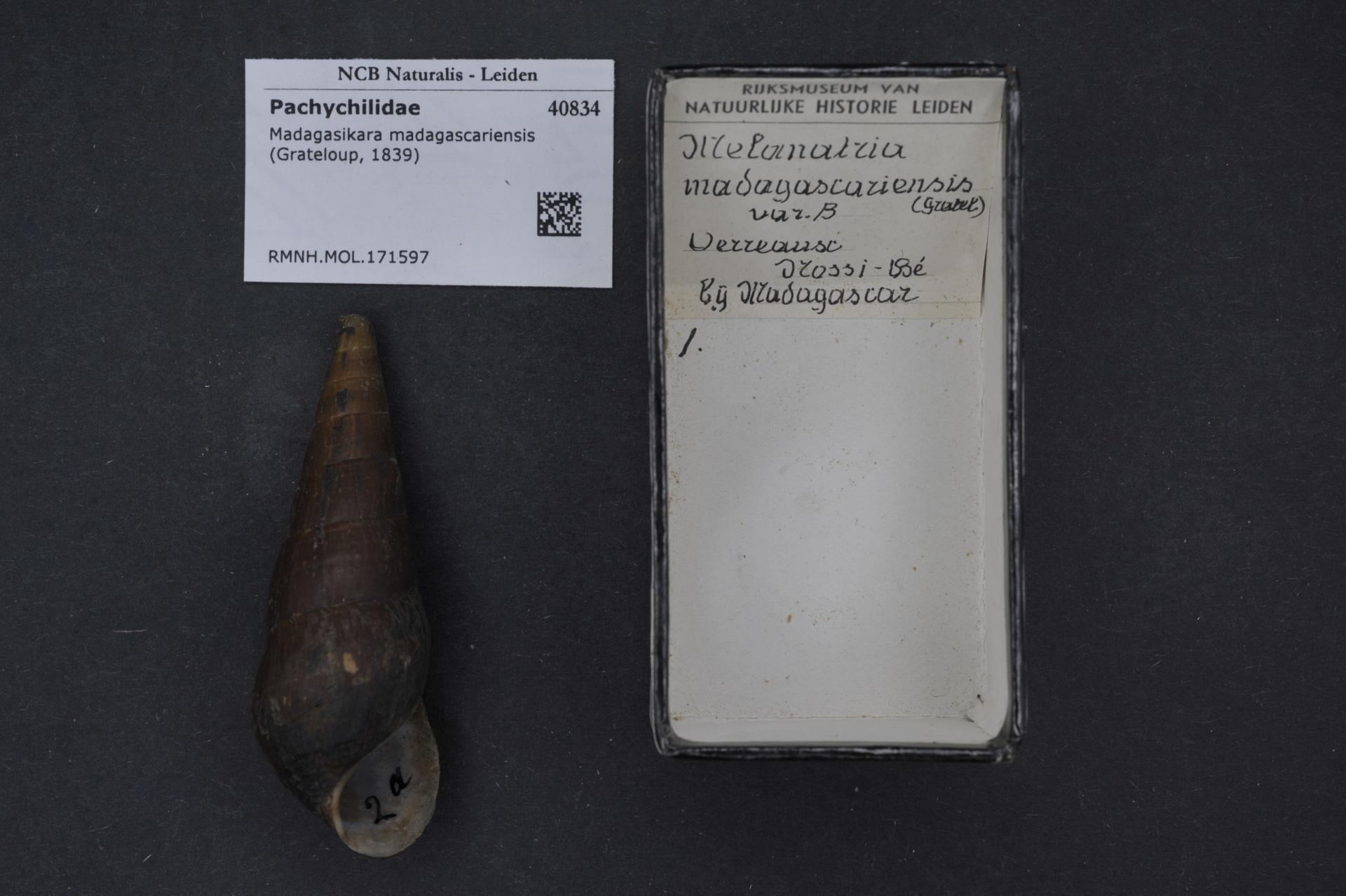 Madagasikara madagascariensis (Grateloup, 1839)